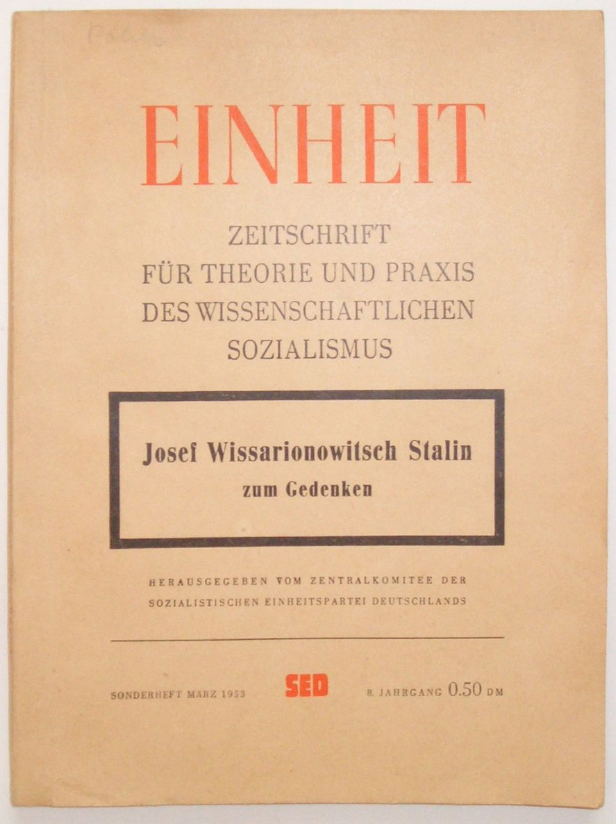 Einheit. Zeitschrift für Theorie und Praxis des wissenschaftlichen Sozialismus. Josef Wissaronotisch Stalin zum Gedenken. Herausgegeben vom Zentralkomitee der Sozialistischen Einheitspartei Deutschlands. Sonderheft März 1953. Dietz Verlag Berlin